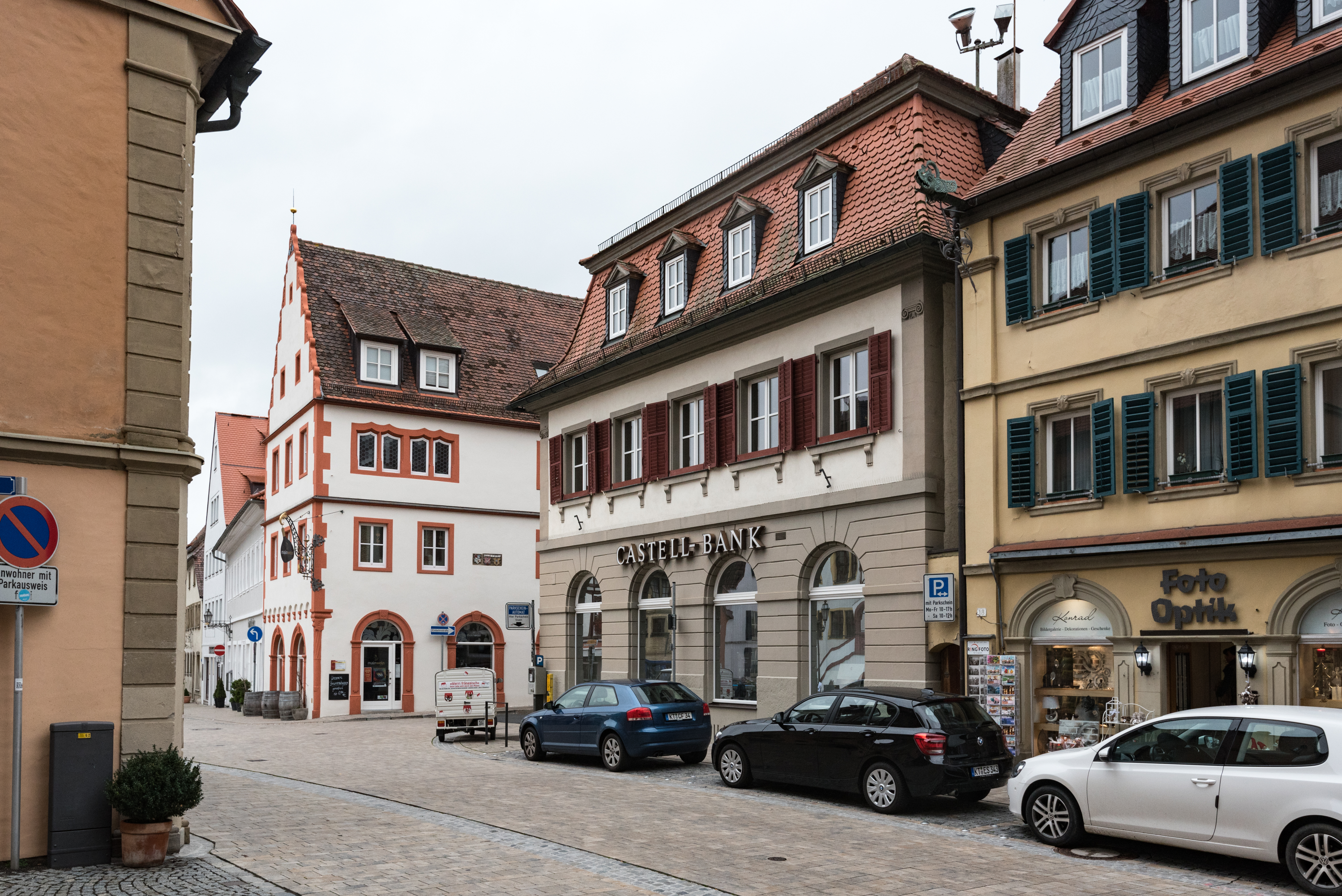 Volkach, Hauptstraße 22, 20